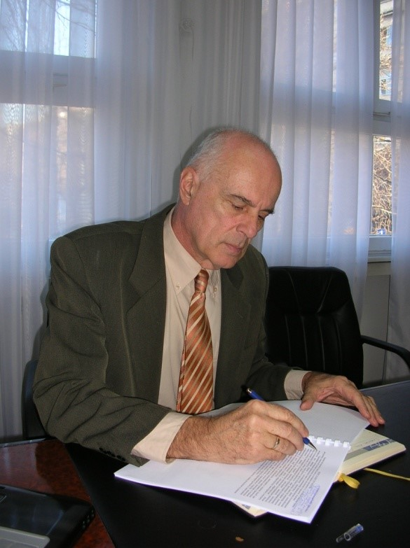 Борислав Стојков